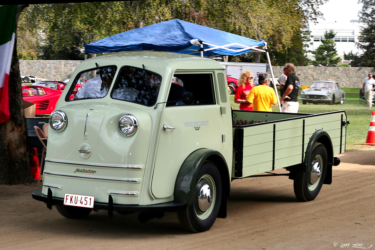 1951 Tempo Matador - fvl-1